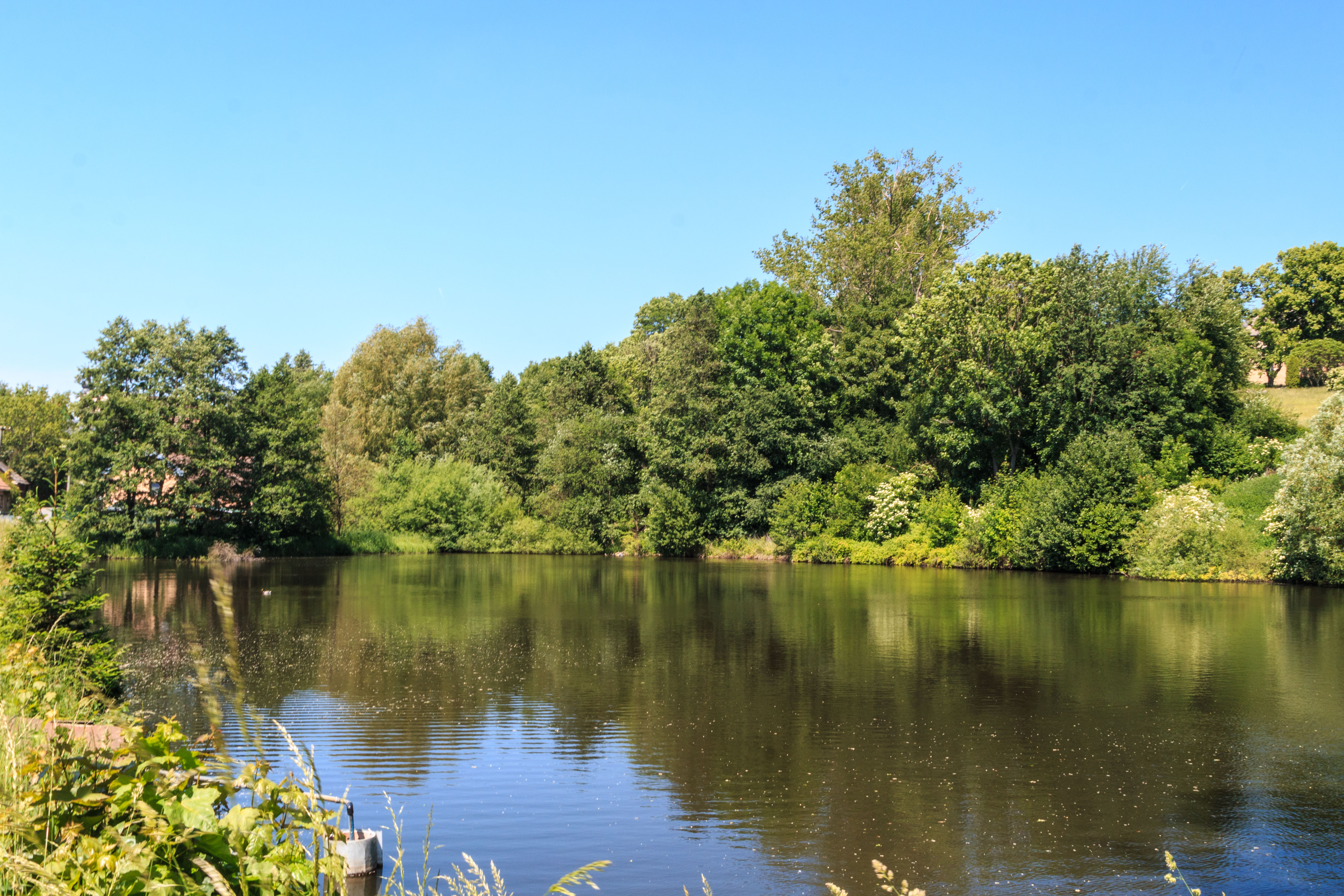 Rybník Rebeka v Bystrém Project: Vodstvo.